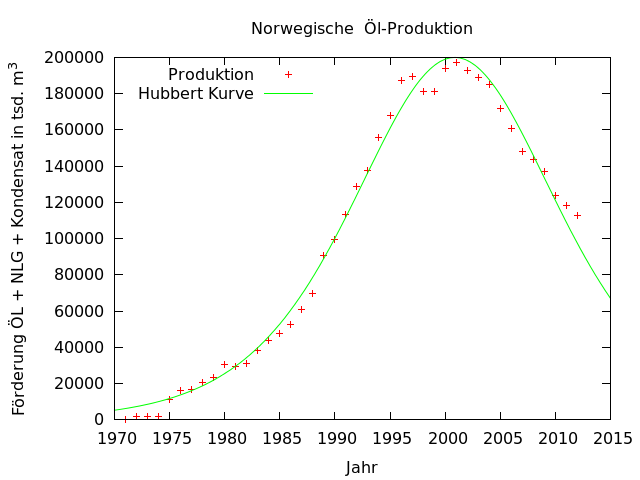 Die Norwegische Ölproduktion bis 2013 und eine angepasste Glockenkurve.